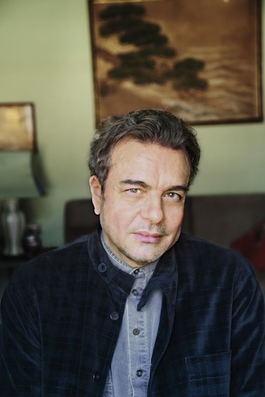 Jean Pavans en 2015